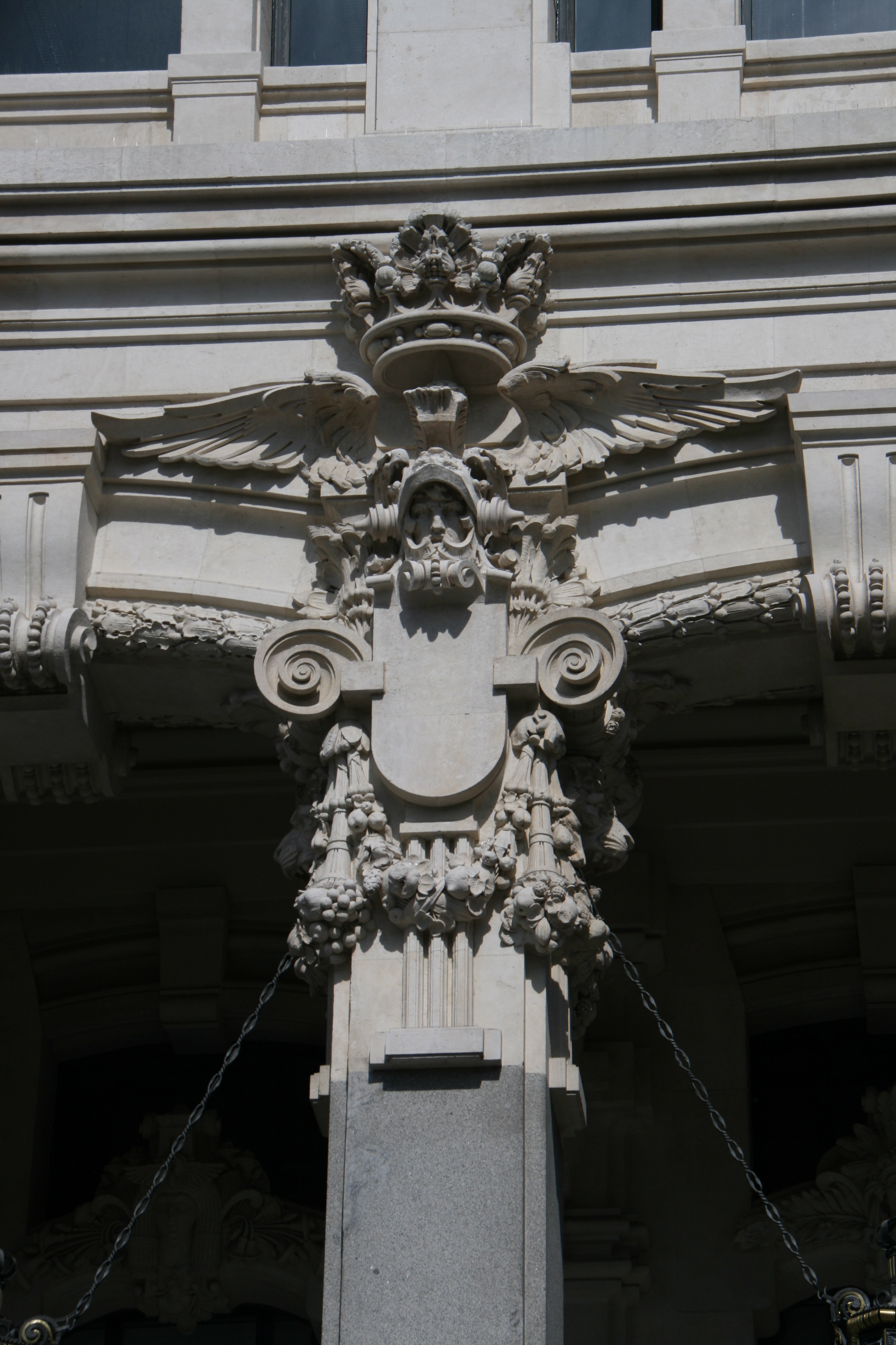 Detalle de la enjuta del Pórtico de los Buzones del Palacio de Comunicaciones (Palacio de Cibeles).